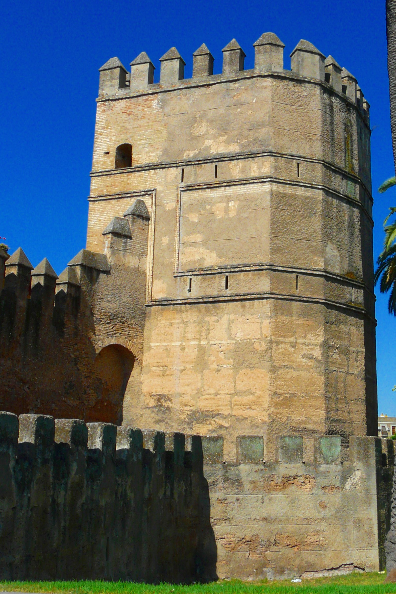 muraille de la macarena à Séville